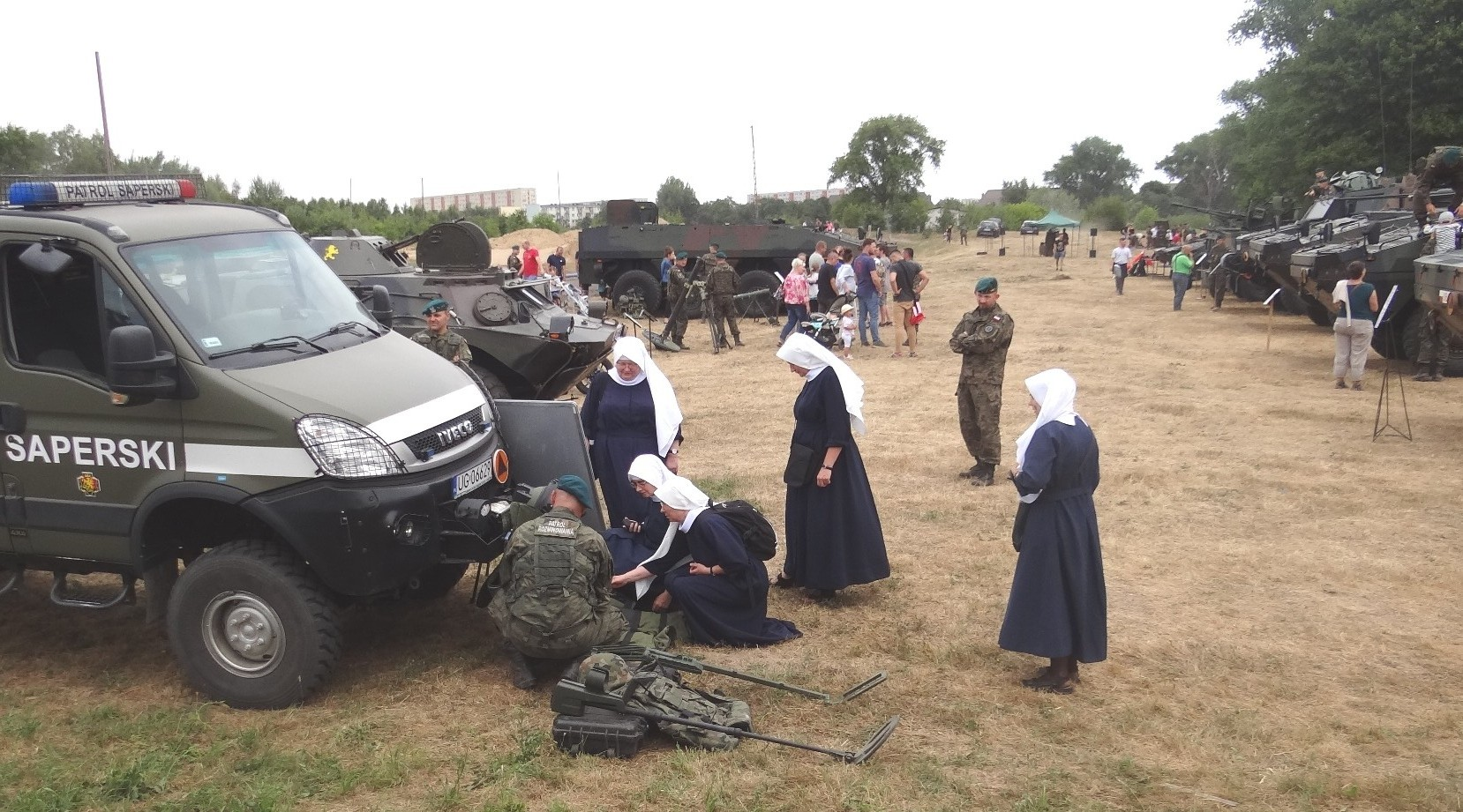 Obchody święta 2 batalionu piechoty zmotoryzowanej (07.07.2018)